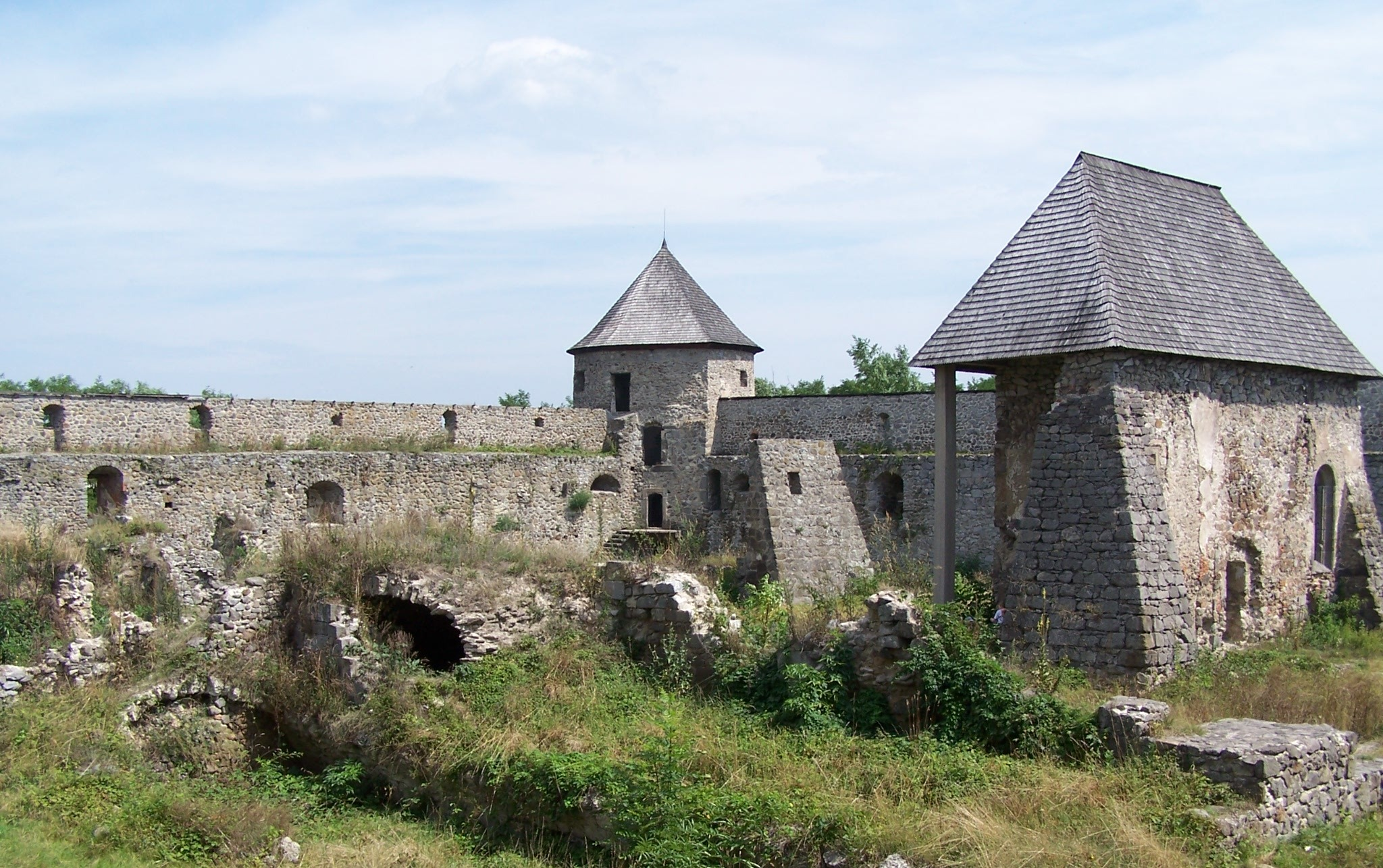 Bzovík Castle, Slovakia, Krupina district